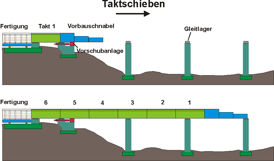 Skizze des Taktschiebeverfahren